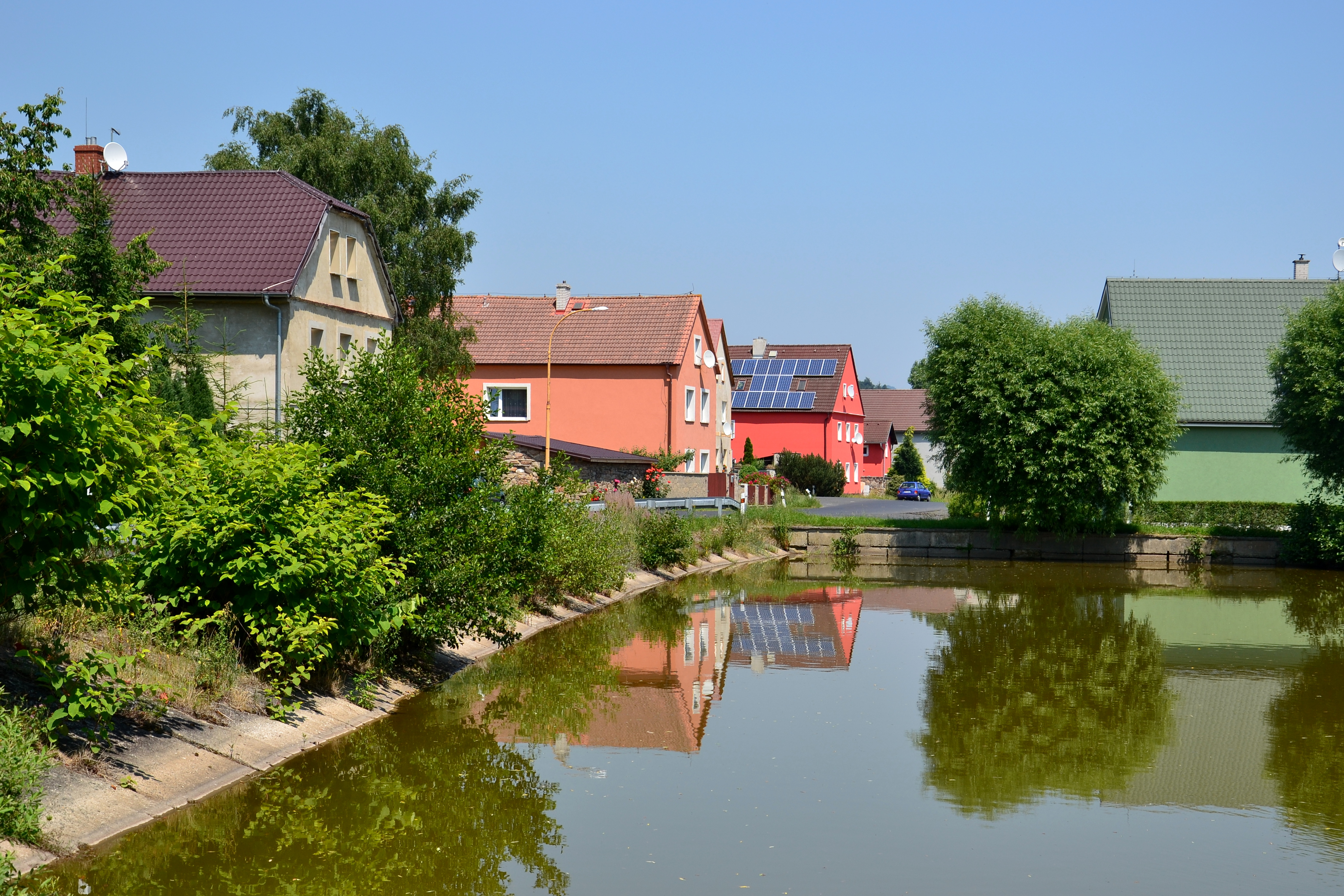 Návesní rybník